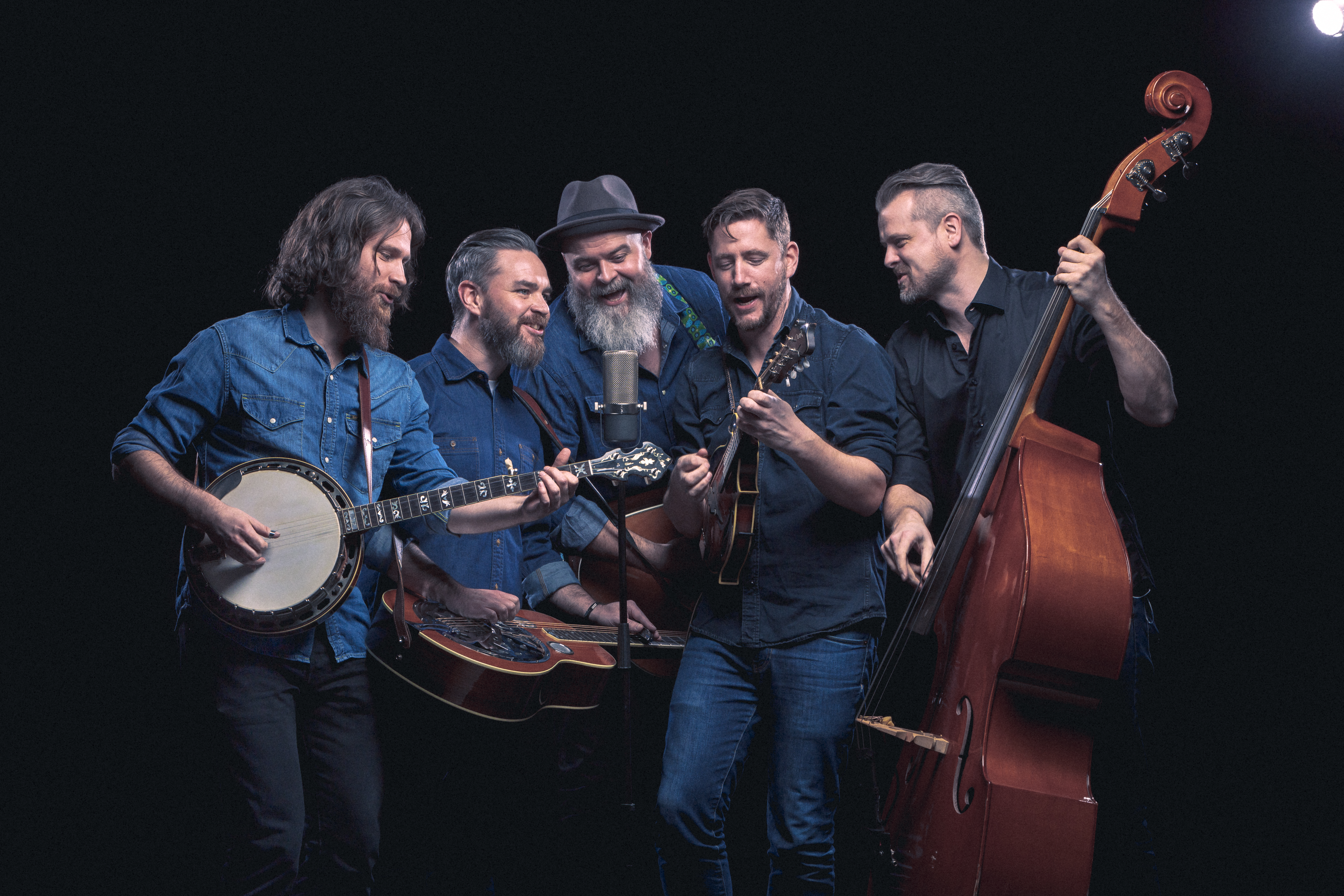 Ila Auto